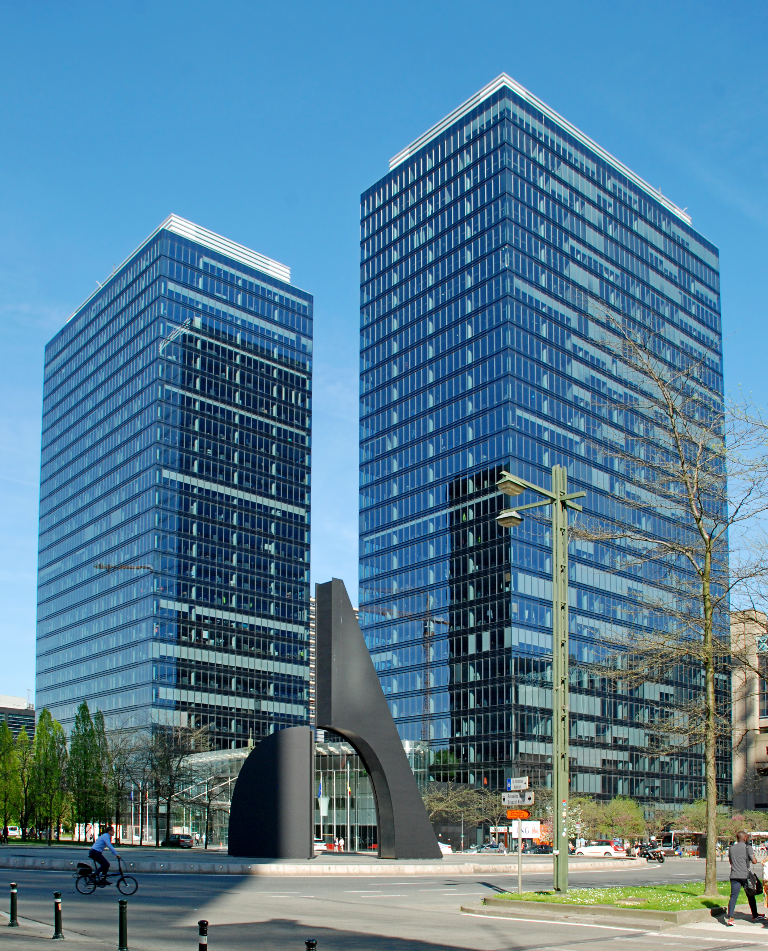 Belgique - Bruxelles - North Galaxy Towers (architecture postmoderne - Bureau d'architecture Henri Montois, Jaspers et Art & Build - 2004)